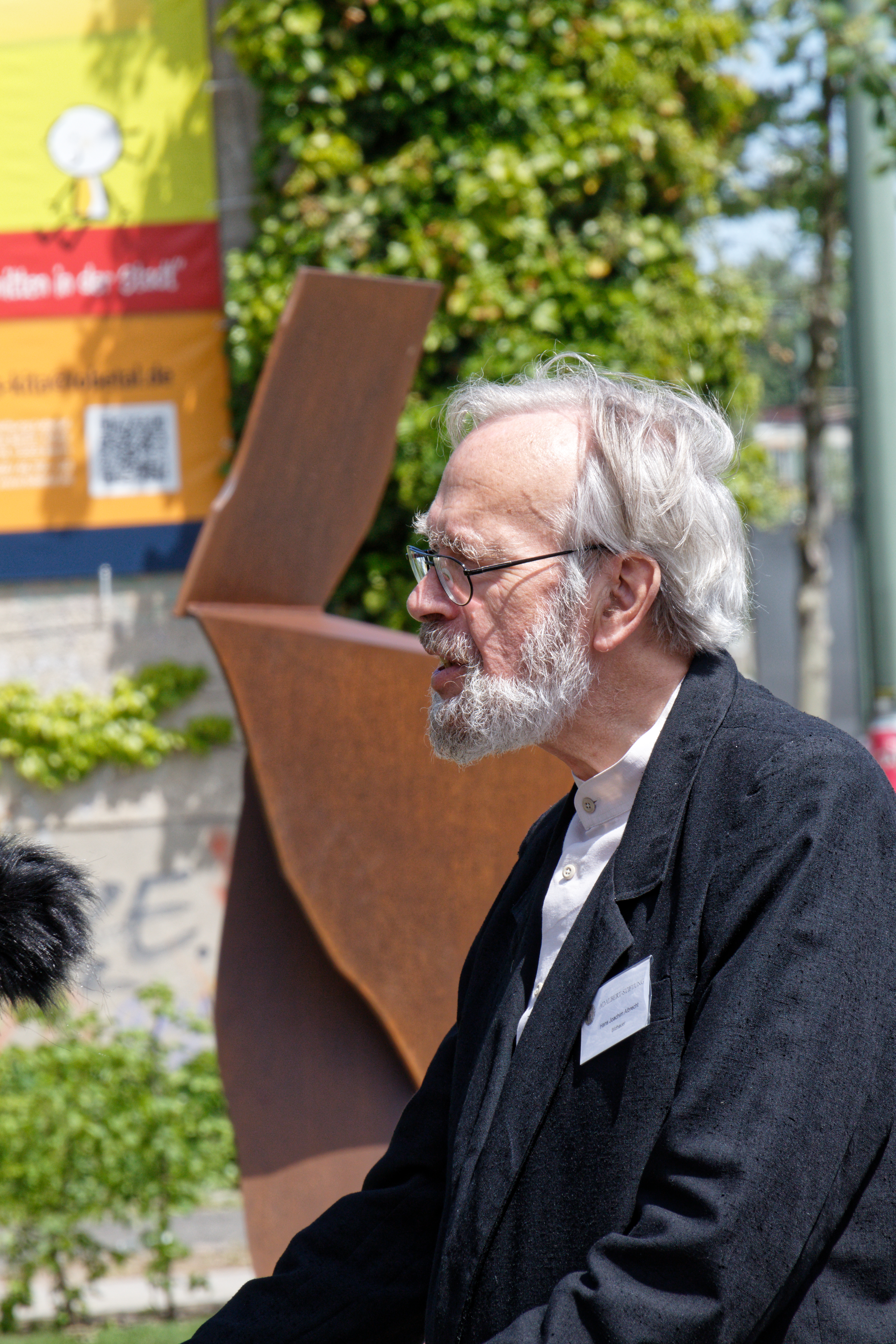 Einweihung des Denkmals zur Würdigung des Beitrags der Adalbert-Länder zum Mauerfall